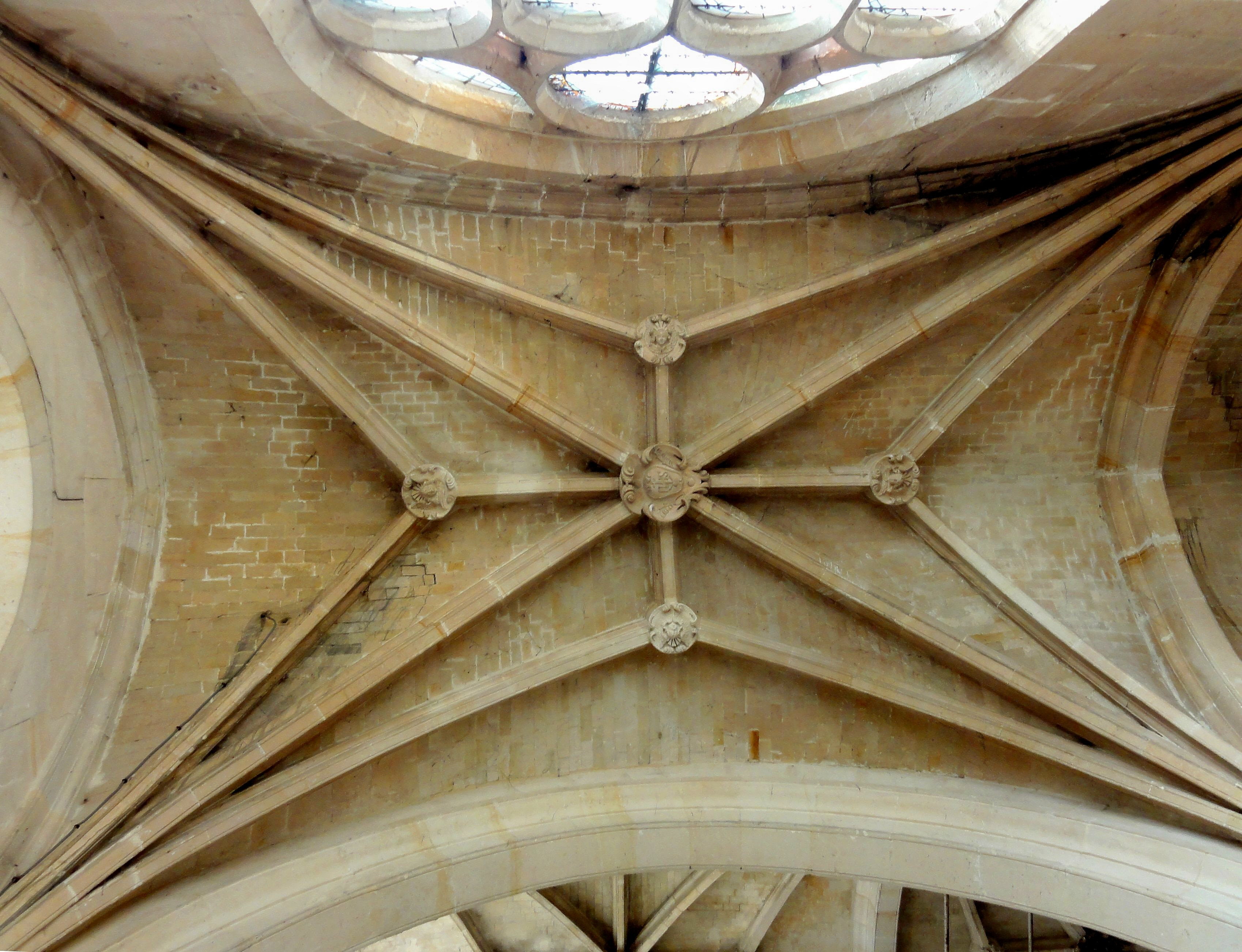 Bas-côté sud, voûte de la première travée.